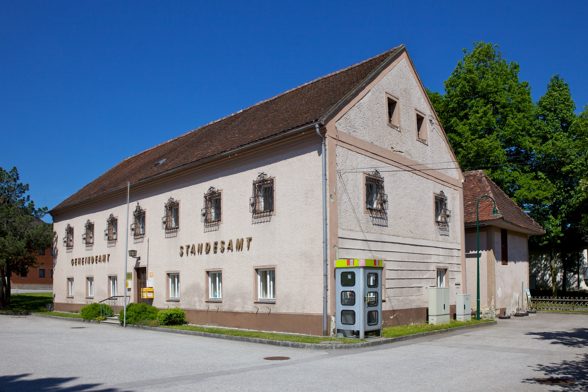 Rathaus/Gemeindeamt Inzersdorf im Kremstal